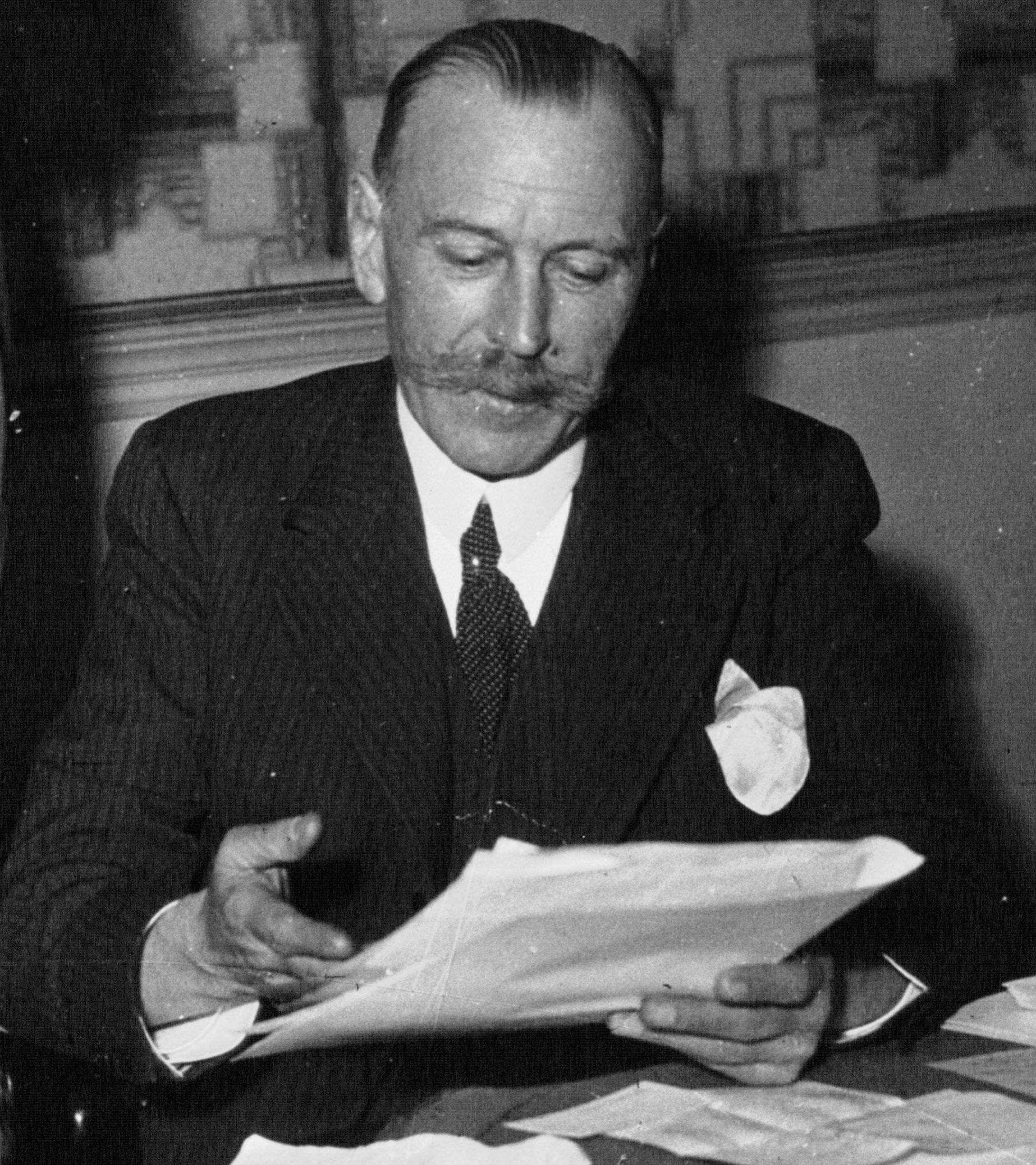 Le commissaire Marcel Guillaume lors de la transmission des pouvoirs à la police judiciaire entre lui-même et André Roches, 1937.